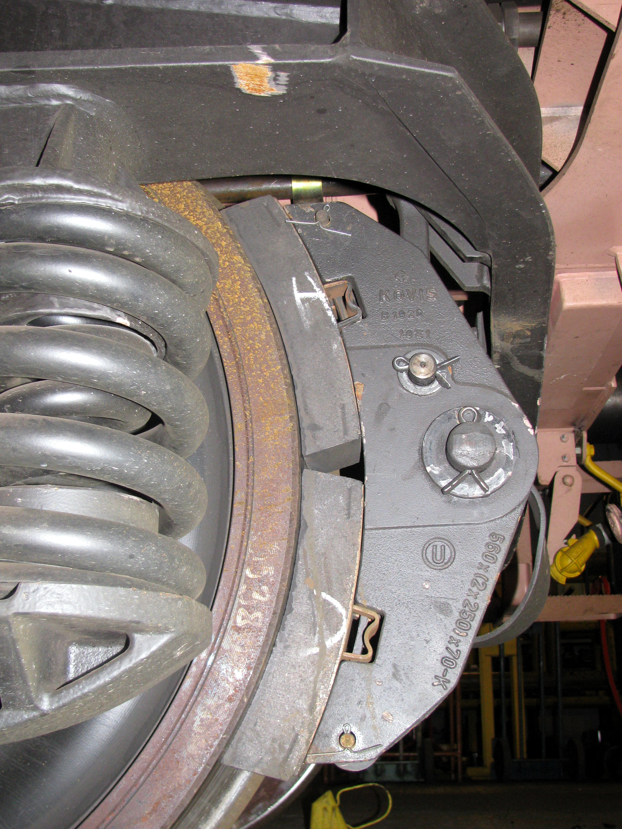 Dvoušpalíková zdrž nákladního podvozku Y25 osazená nekovovými špalíky